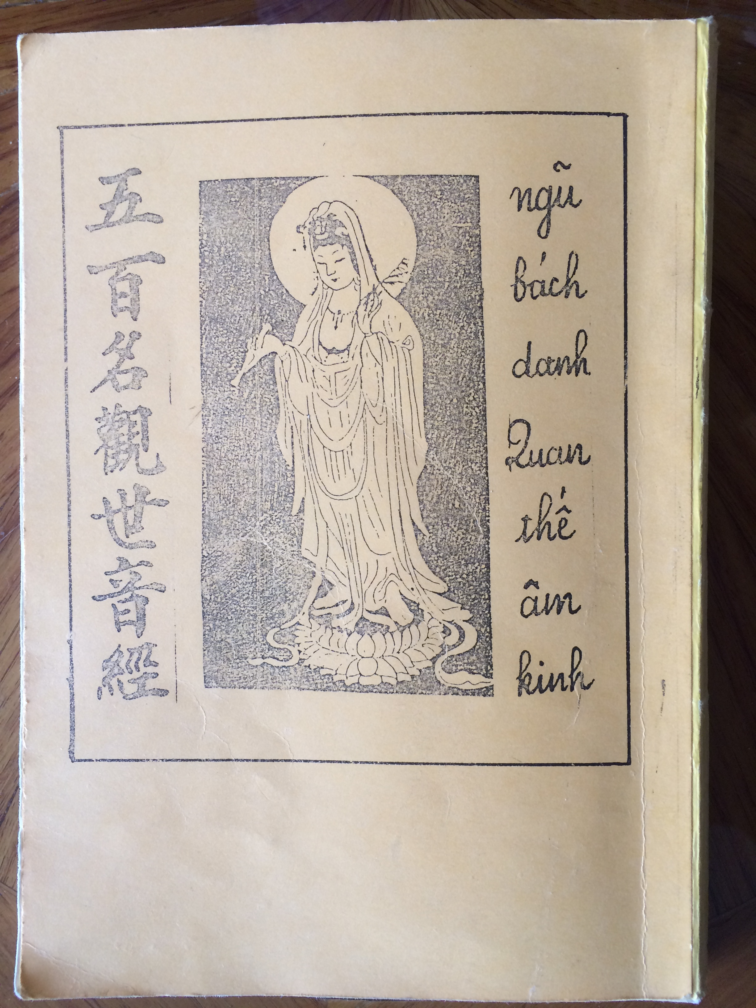 Couverture du livre intitulé Le soutra des cinq cents appellations d'Avalokiteshvara.